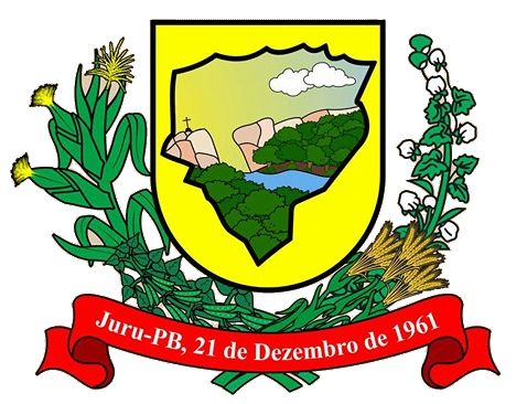 Brasão de Armas do Município de Juru no Estado da Paraíba, Brasil.